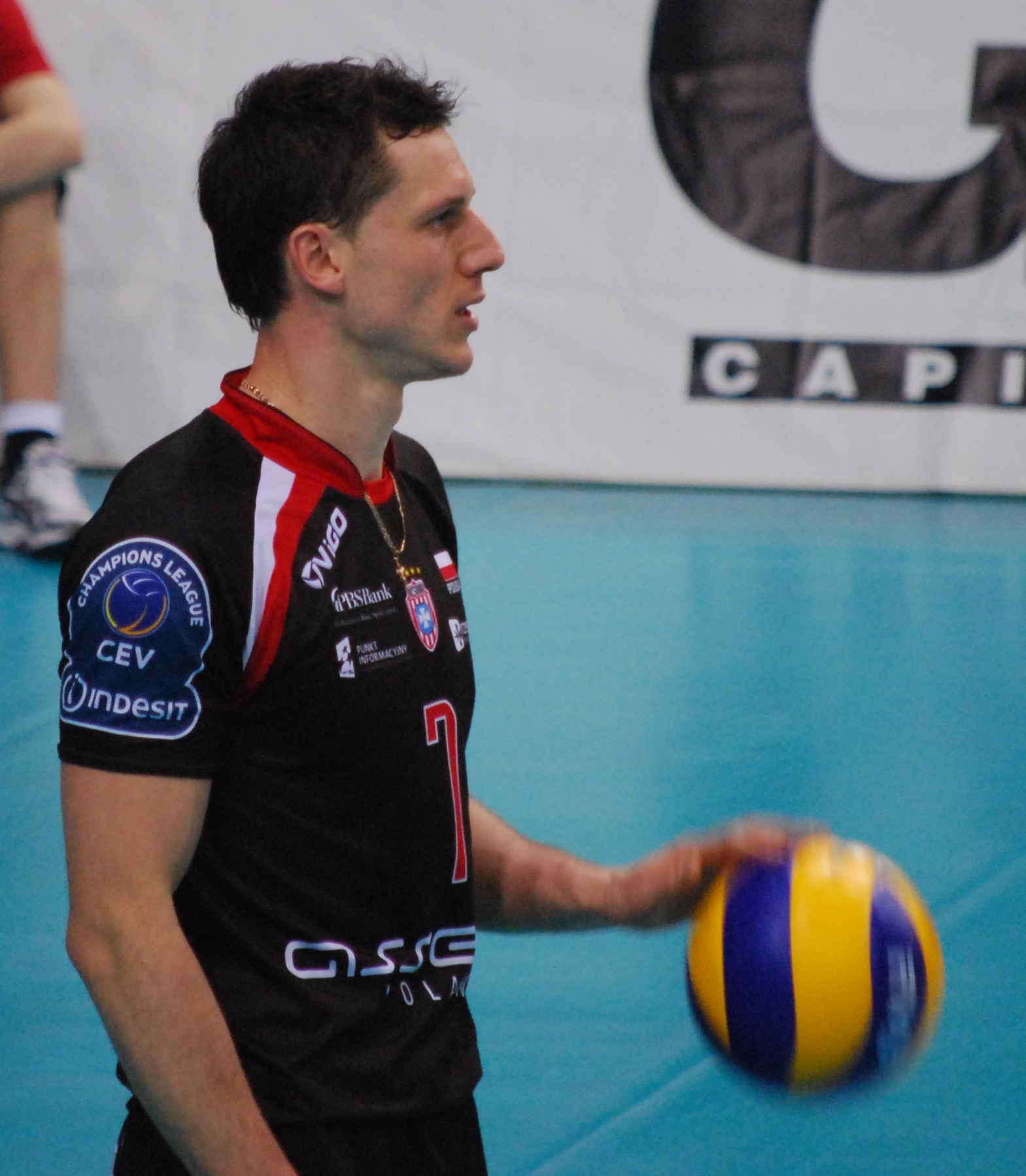 Aleh Akhrem